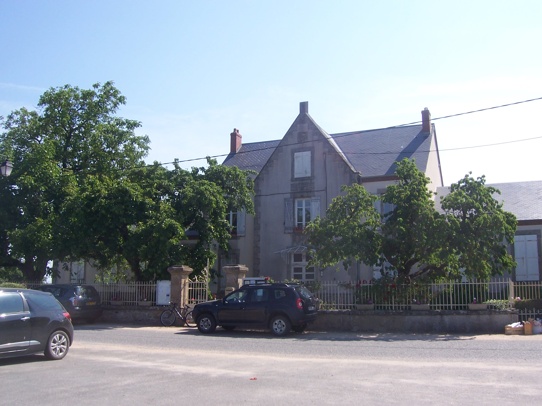 Mairie de Montmort